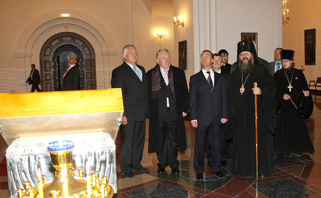 ЯРОСЛАВСКАЯ ОБЛАСТЬ, Ярославль. Дмитрий Медведев в Успенском кафедральном соборе.